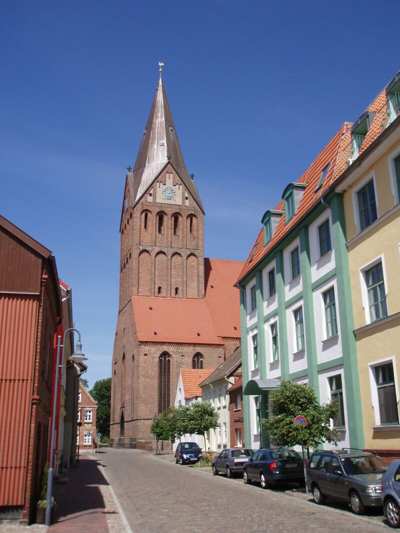 Stadtkirche von Barth